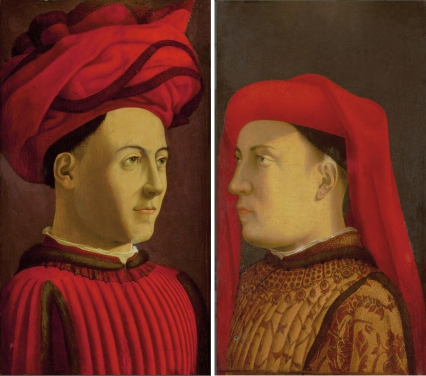 Portraits of two members of Medici family // Landolt Haus, Zurich. Possibly copies from destroyed fresco in S. Egidio // Double portrait of Medici personages, two joined panels, Zurich, Kunsthaus (Gottfried Keller-Stiftung store) // Doppio ritratto di personaggi della famiglia Medici, due tavole congiunte, Zurigo, Kunsthaus (deposito del Gottfried Keller-Stiftung)